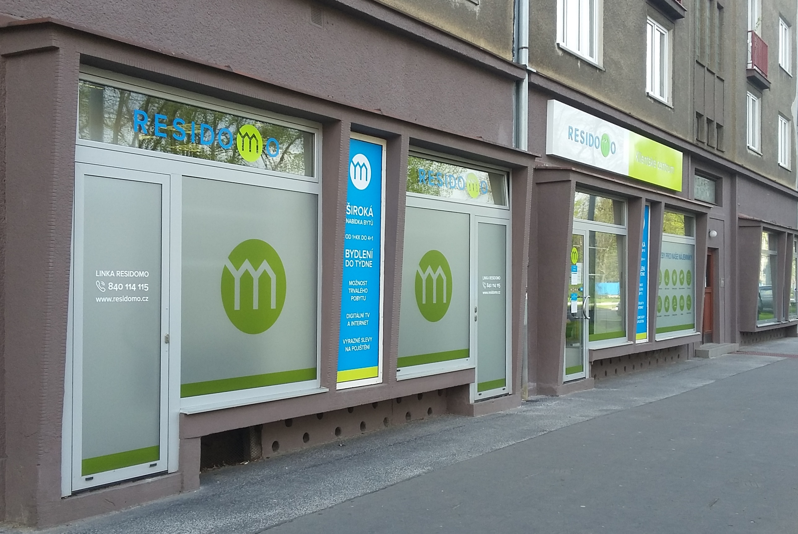 Residomo, kontaktní centrum